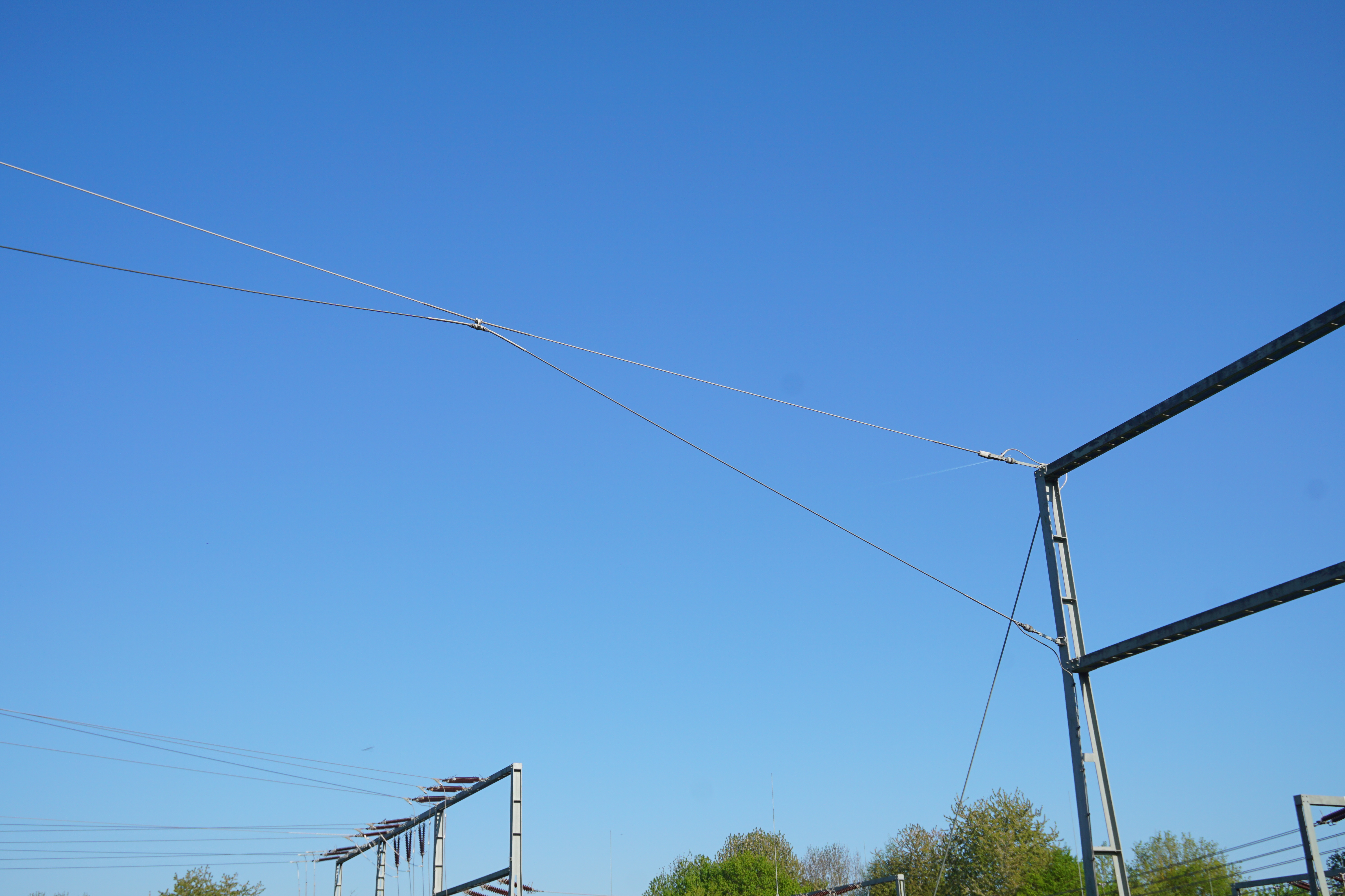 Umspannwerk Sindelfingen, Details.